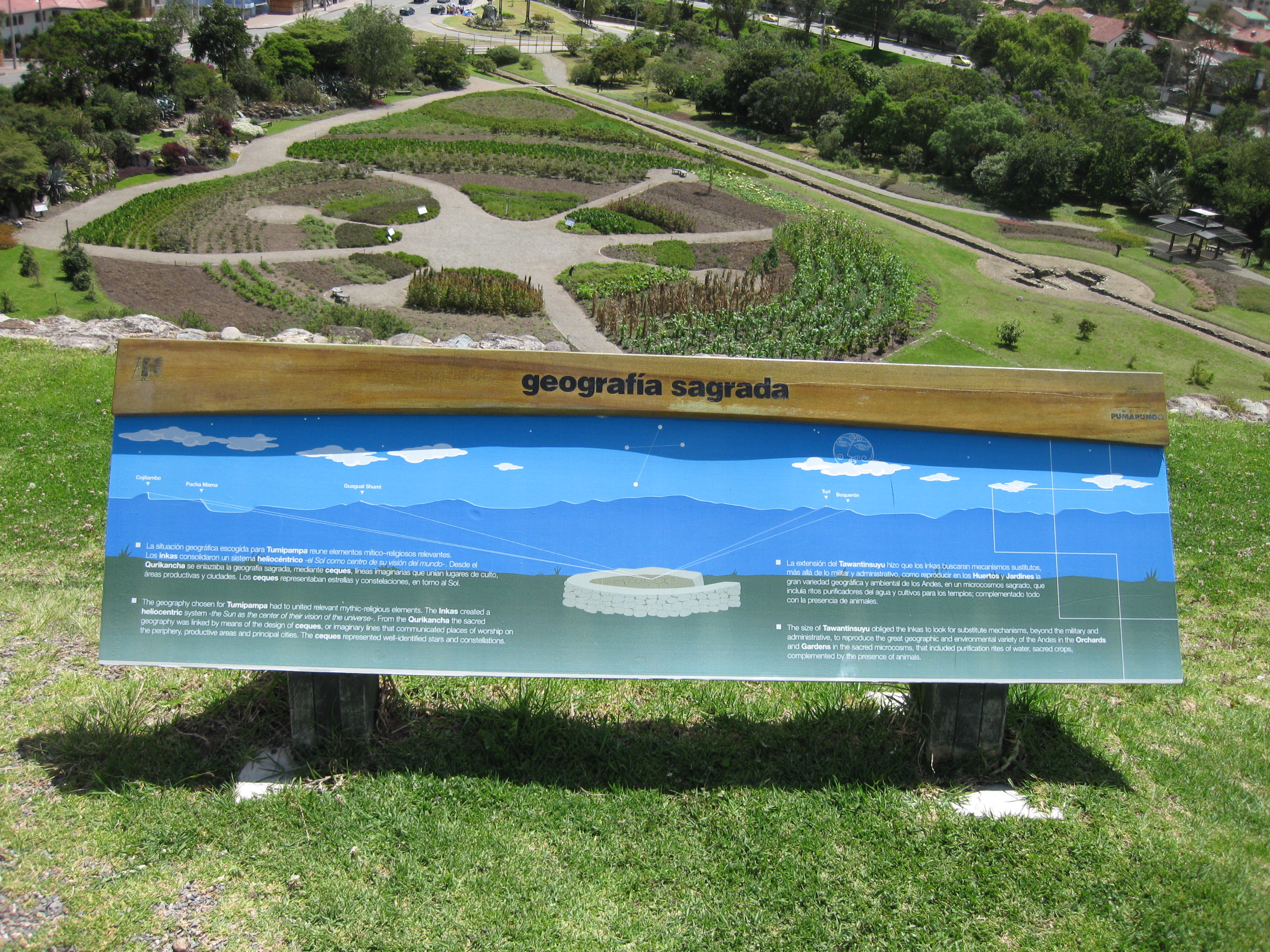 der Archäologische Park nahe Cuenca ist sehr vielgestaltig...Ruinen, Andengärten, Andenfauna usw.